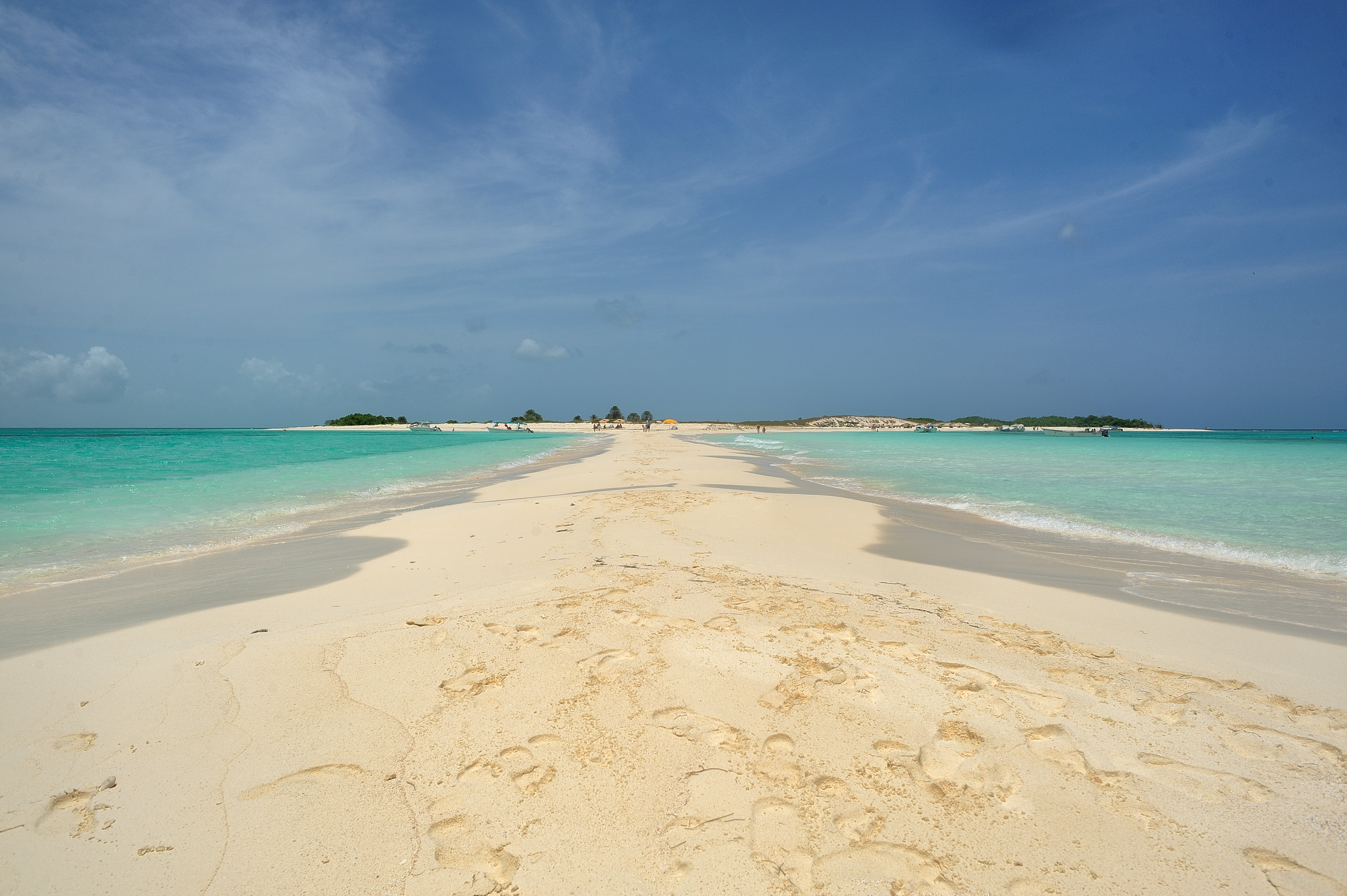 Puente de Arena en el Cayo de Agua, Parque Nacional Archipiélago de Los Roques, Dependencias Federales Venezolanas.